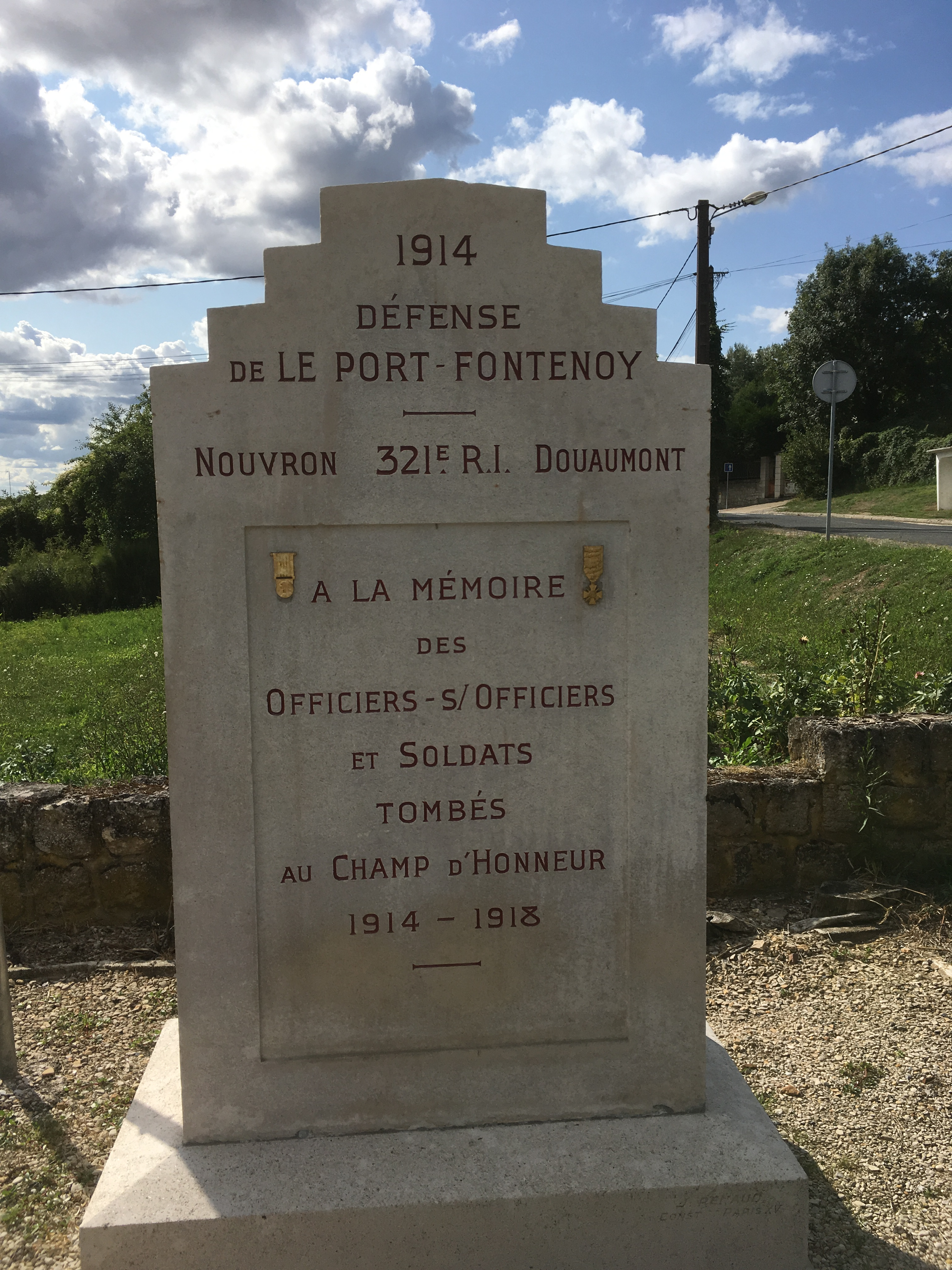 Monument commemoratif au 321 ème régiment d’infanterie engagé pensant la guerre de 14-18 à Fontenoy dans l’Aisne